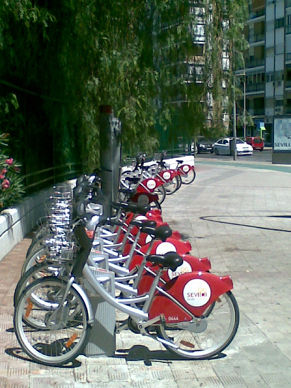 Bicicletas de alquiler SEVICI Sevilla